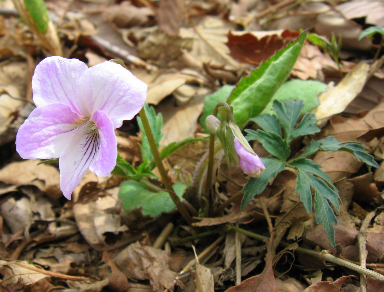 Viola eizanensis (エイザンスミレ)